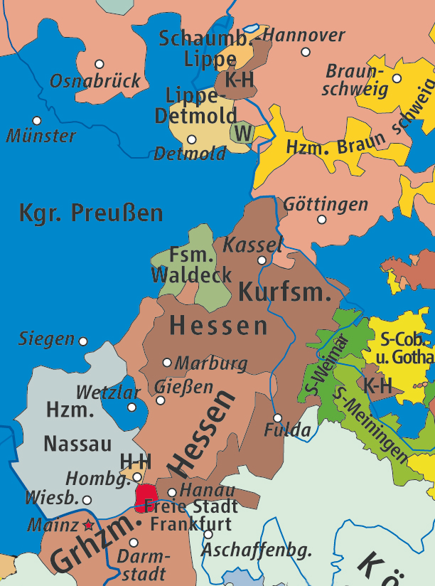 Karte von Hessen-Kassel und Landesteilen Schmalkalden und Schaumburg 1866 / Map of Hesse-Kassel and the districts Schmalkalden and Schaumburg 1866 – Based on Karte des »Deutschen Bundes« 1815–1866 / Map of »German Confederation« 1815–1866 by kgberger